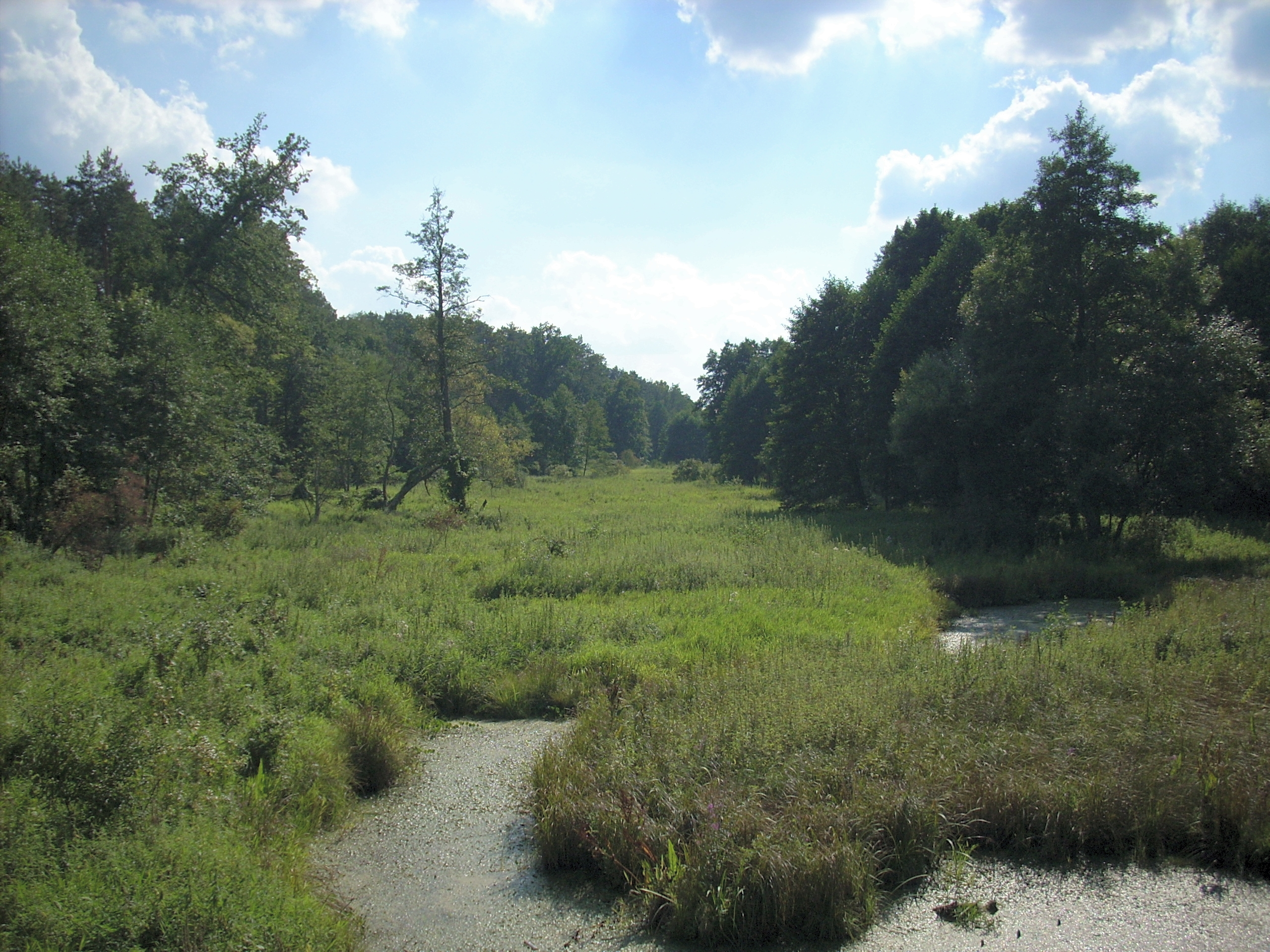 Rozlewisko rzeki Zagożdżonki, Puszcza Kozienicka